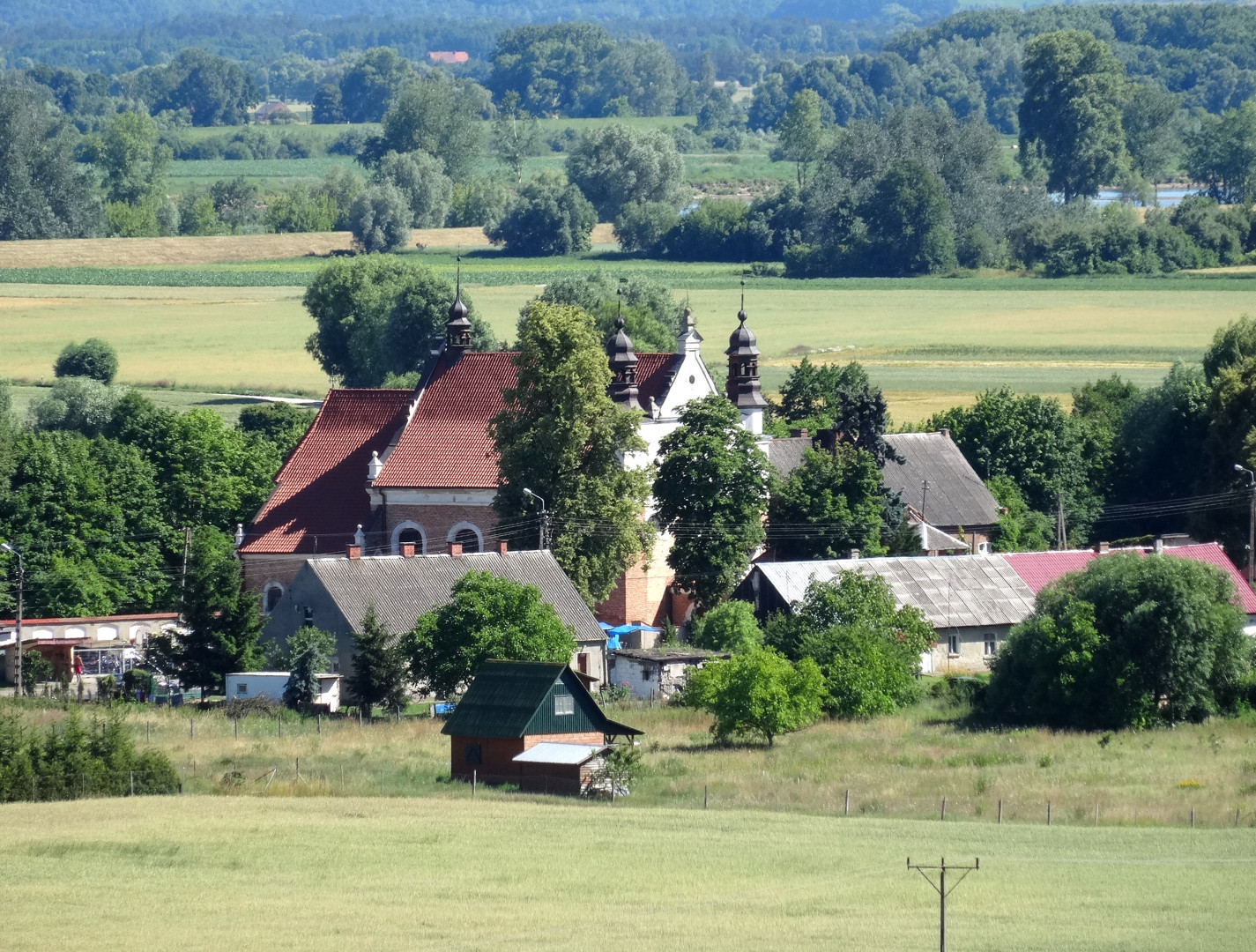 Widok z grodziska Talerzyk koło Topolna na Dolinę Dolnej Wisły